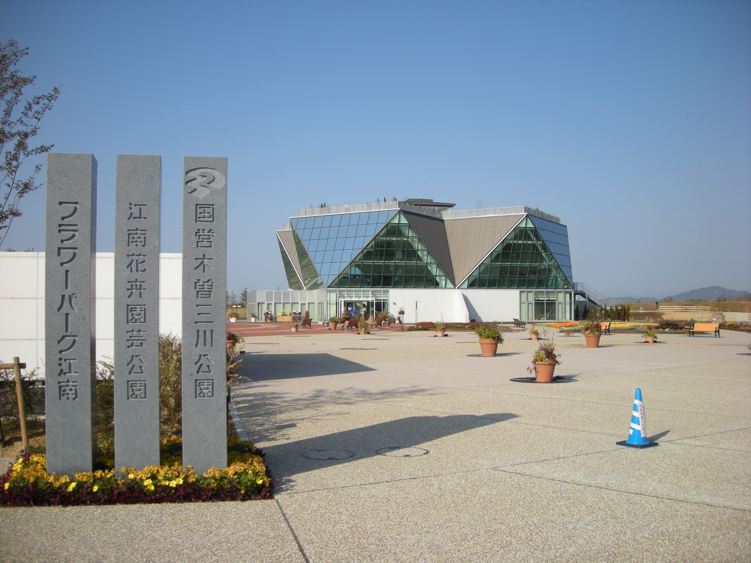 Flour Park Konan（フラワーパーク江南）